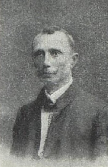 Bohumil Novák (1869-1953), rakouský a český statkář a politik